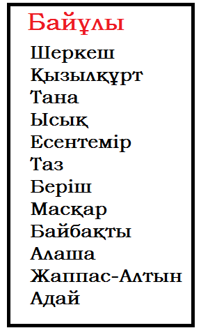 ру тайпа